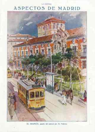 Aspectos de Madrid. El Hospicio, apunte del natural por M. Pedrero.